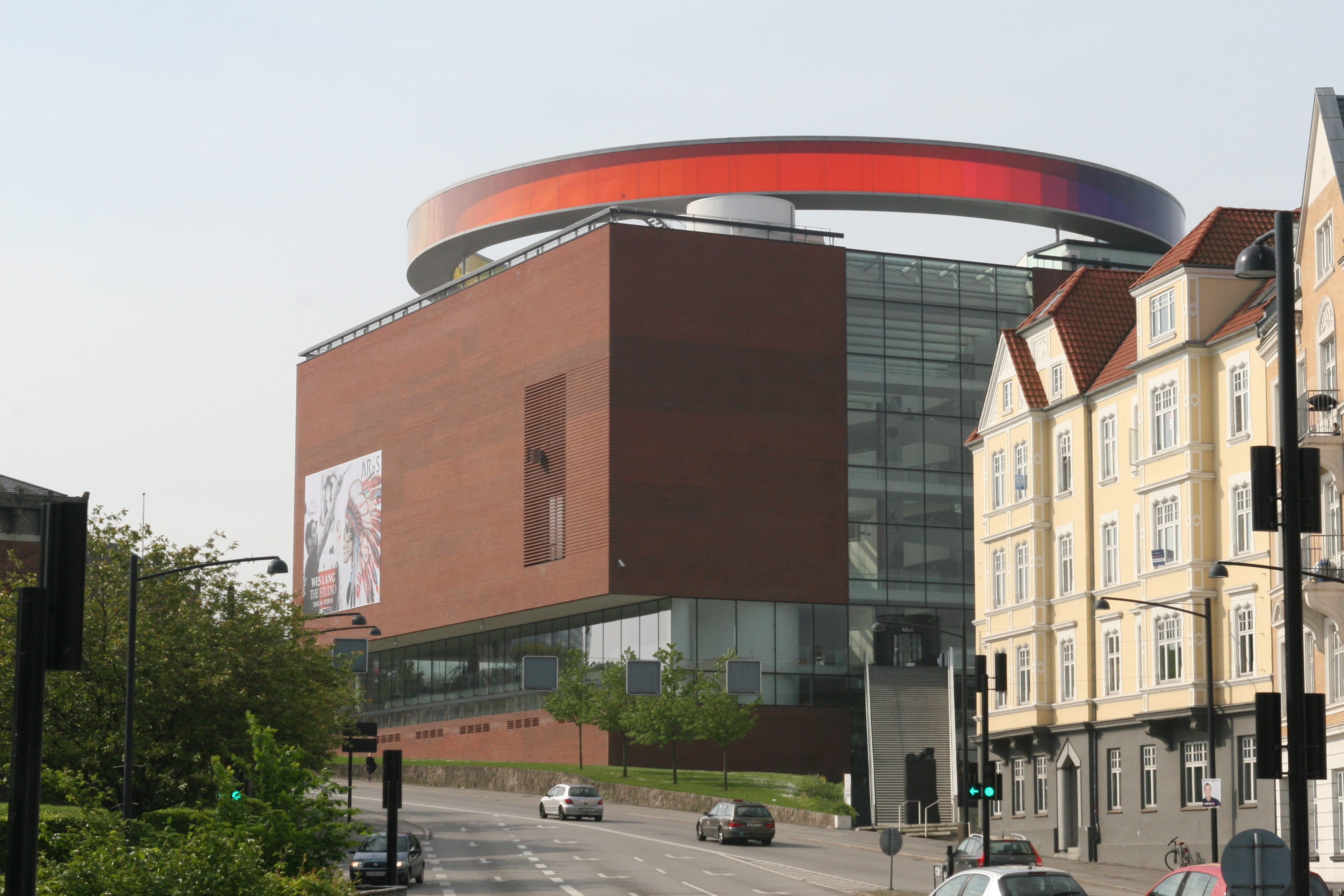 Aros med Your Rainbow Panorama